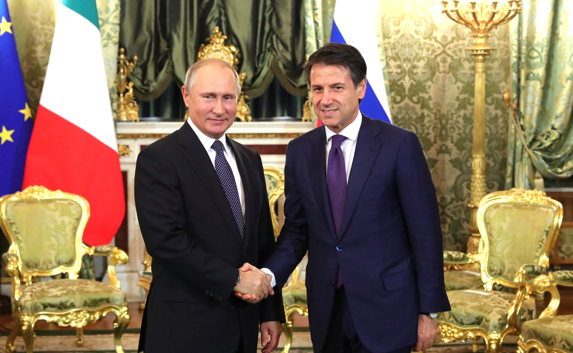 Президент России Владимир Путин с Председателем Совета министров Итальянской Республики Джузеппе Конте